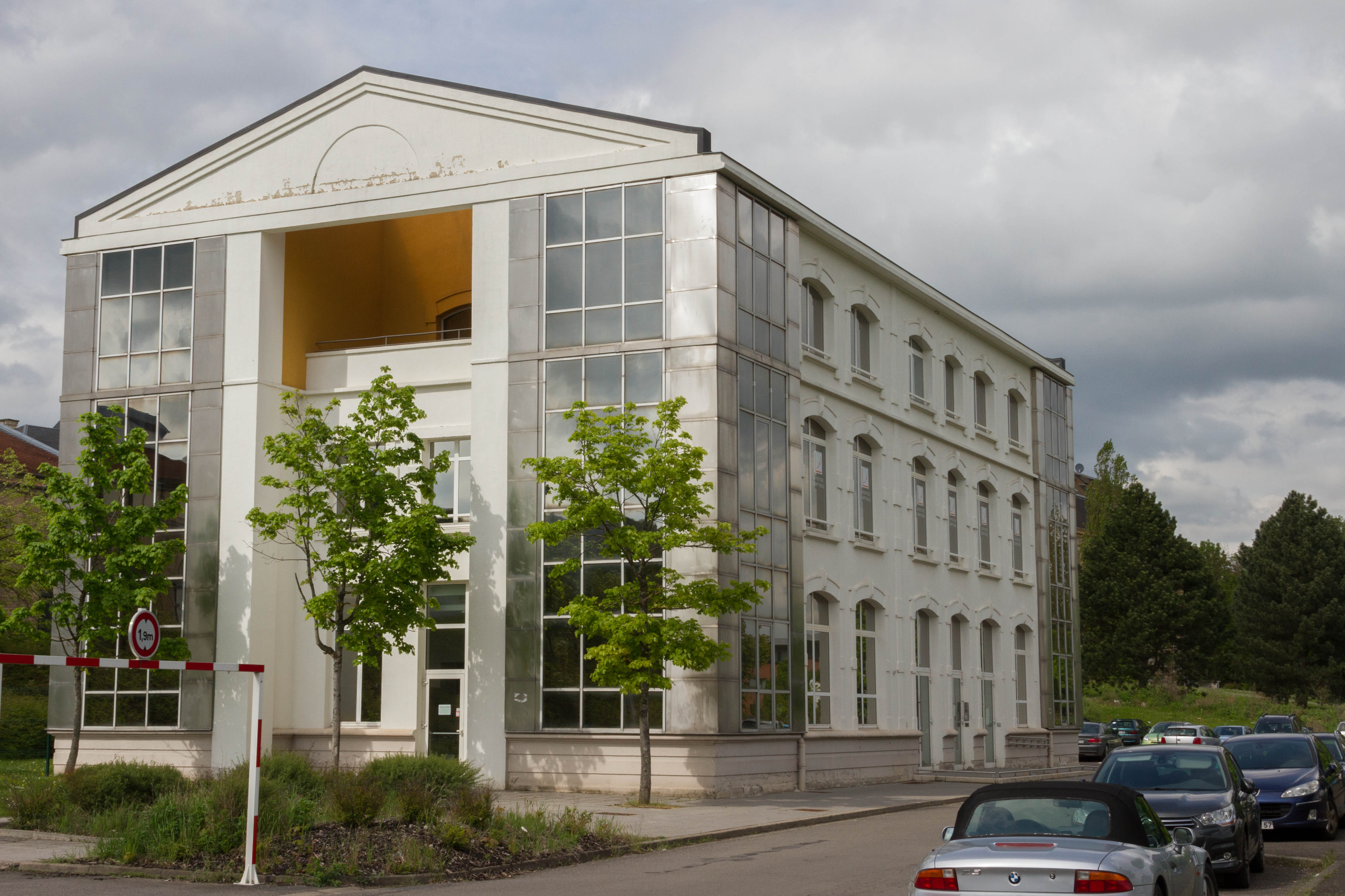 Les essais, Grands Bureaux des Aciéries de Longwy Ancien bâtiment accueillant le pôle recherche et développement des aciéries de Longwy, le bâtiment est maintenant reconverti.